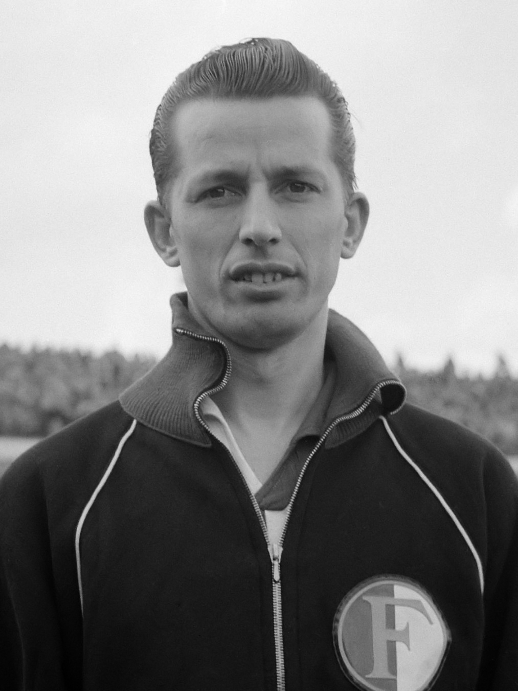 DOS tegen Feyenoord 0-2. Kop van Schouten (Feyenoord) 7 mei 1961